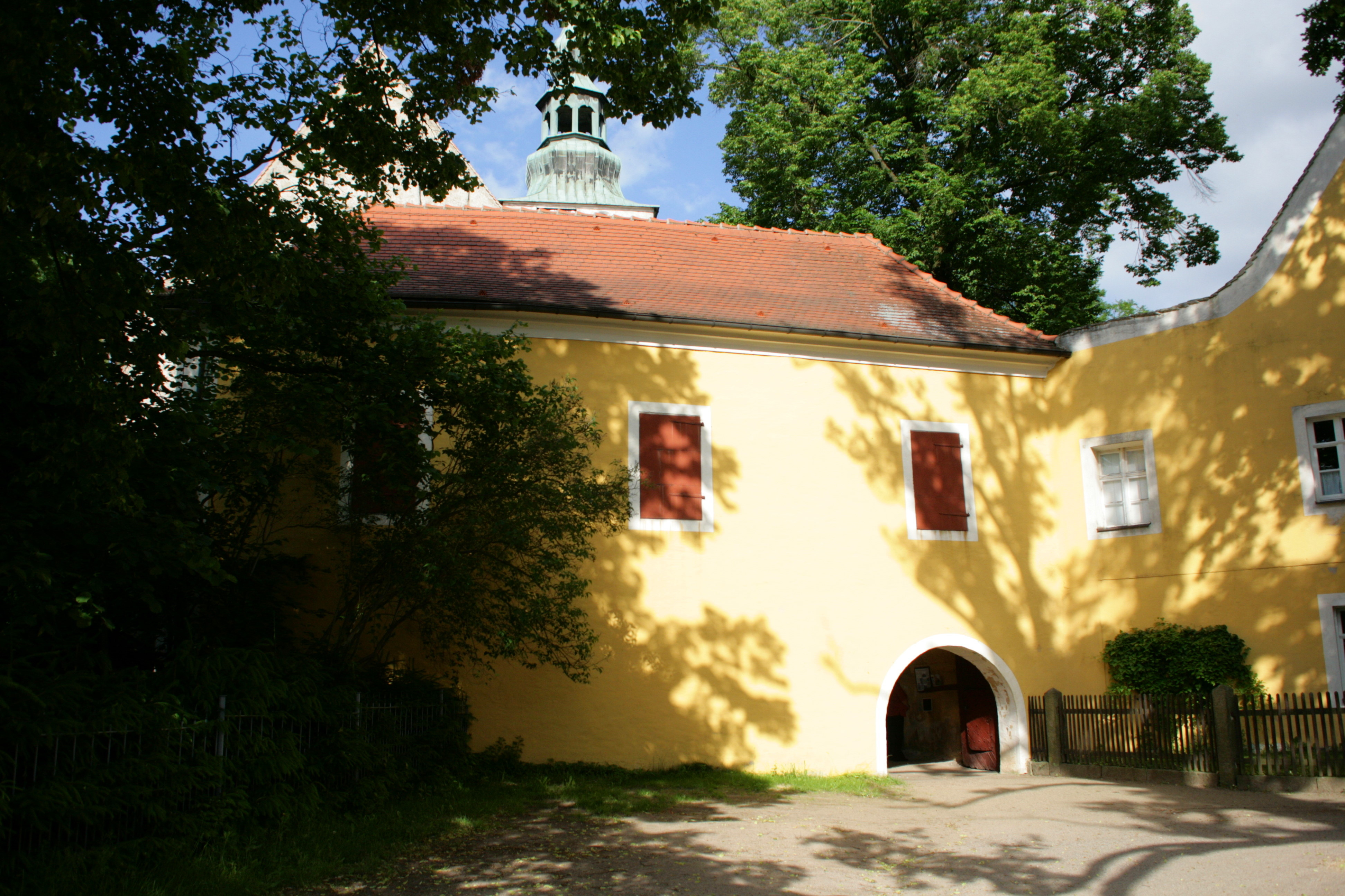 Wehrkirche, Görlitzer Straße in Horka